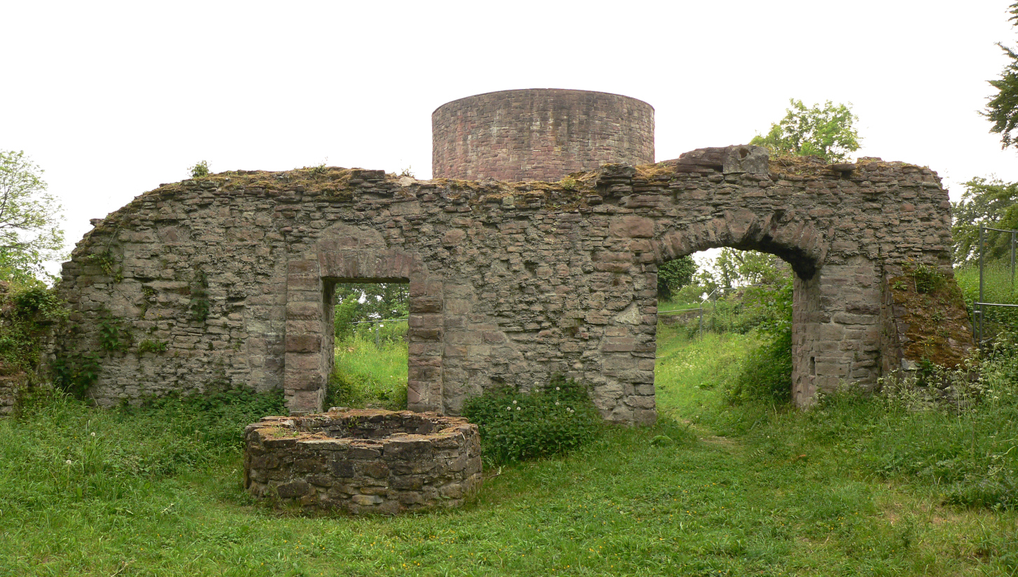 Eingang der Homburg bei Stadtoldendorf